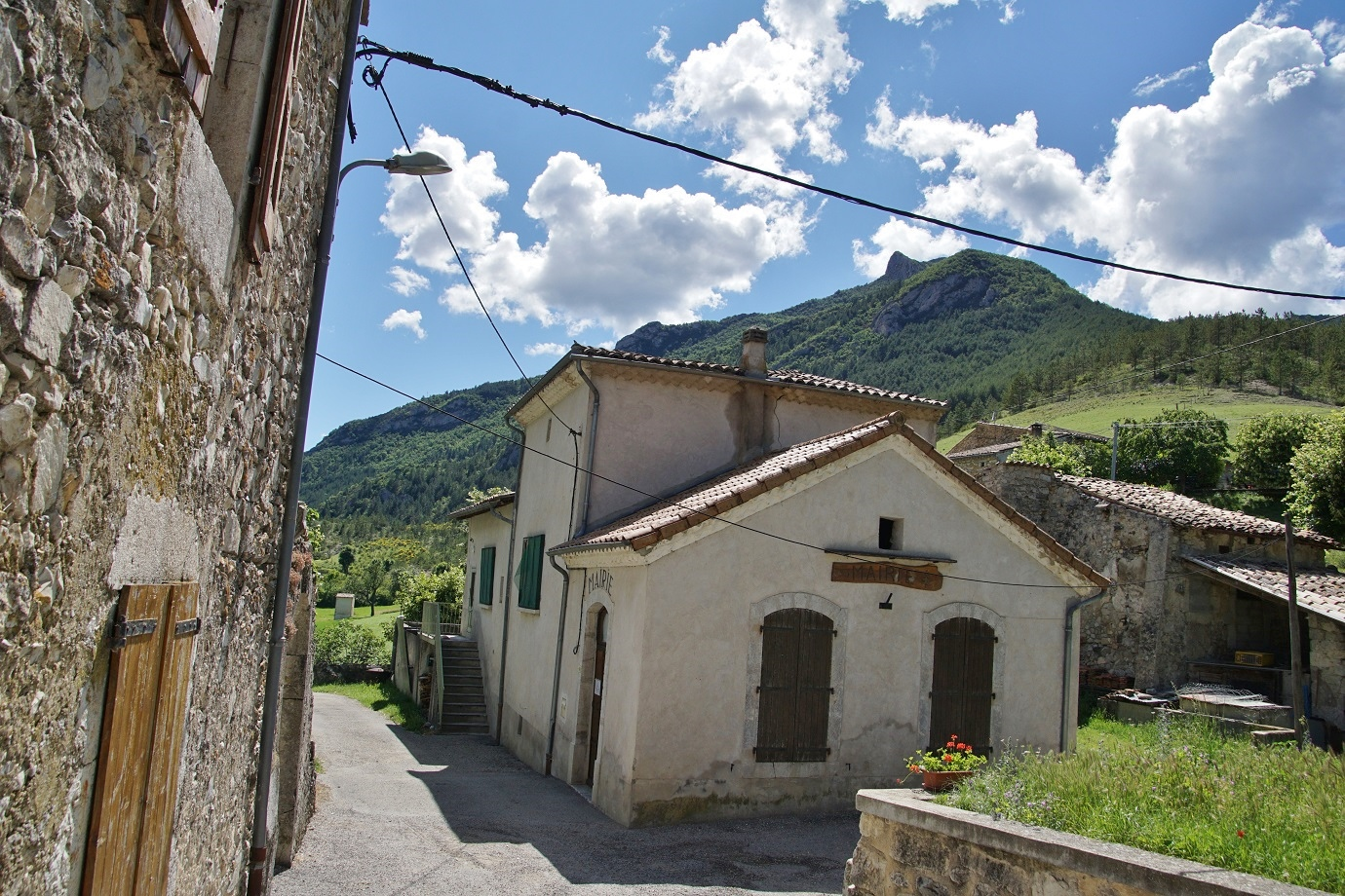 département de la Drôme